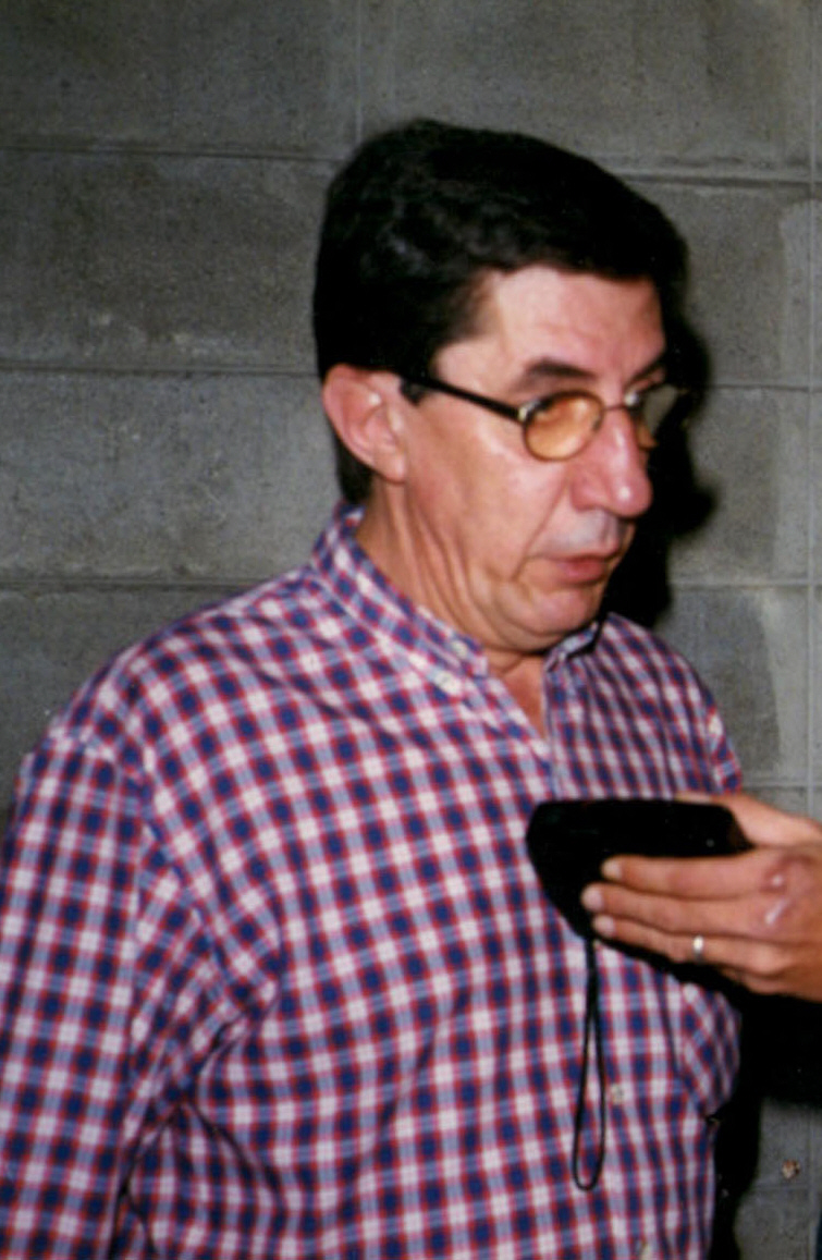 Fotografía del conductor televisivo uruguayo Omar Gutierrez.